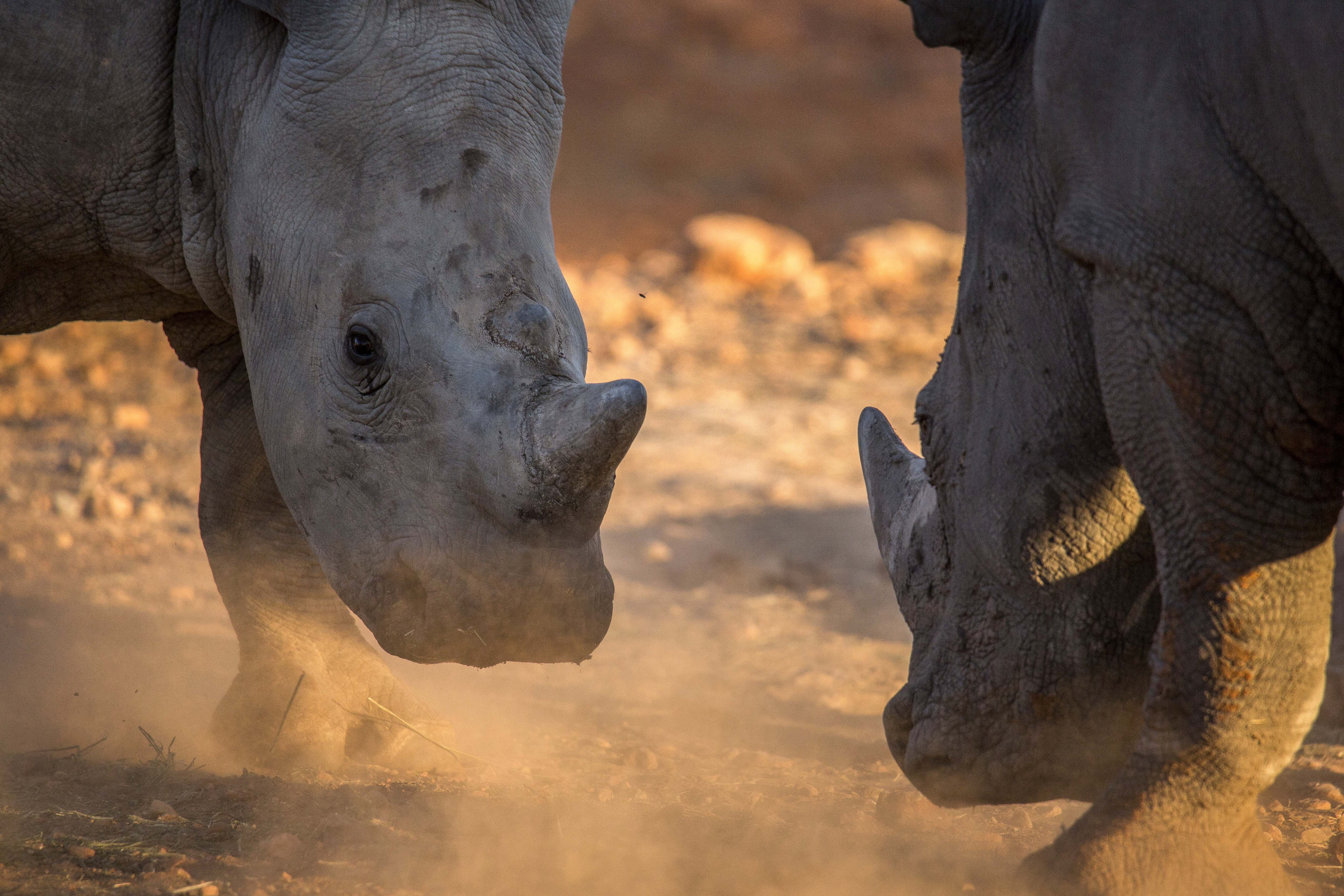 Breitmaulnashörner im Etosha-Nationalpark